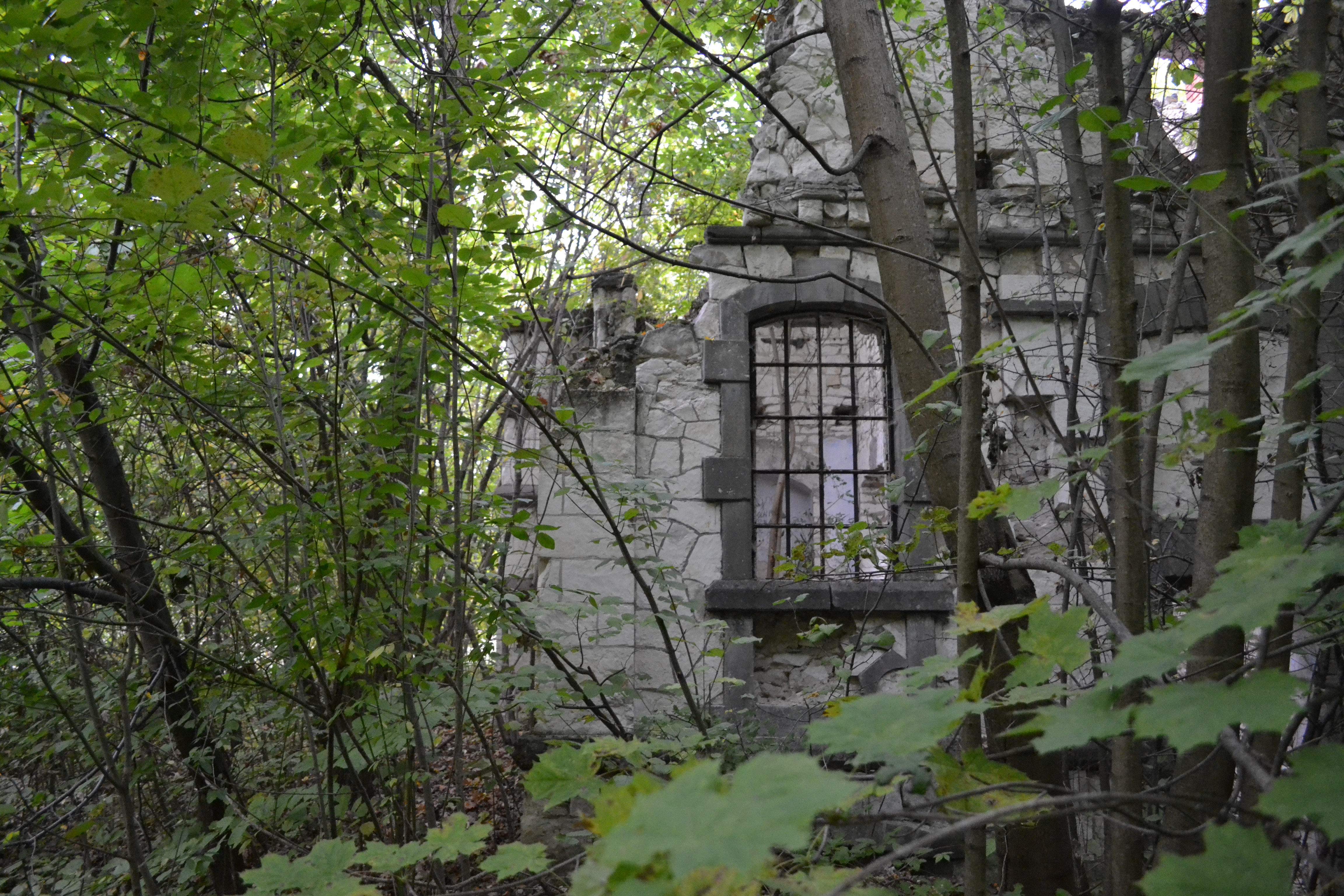 Kazimierz Dolny, willa Szukalskiego (ruina) (z ogrodem ?), 1914